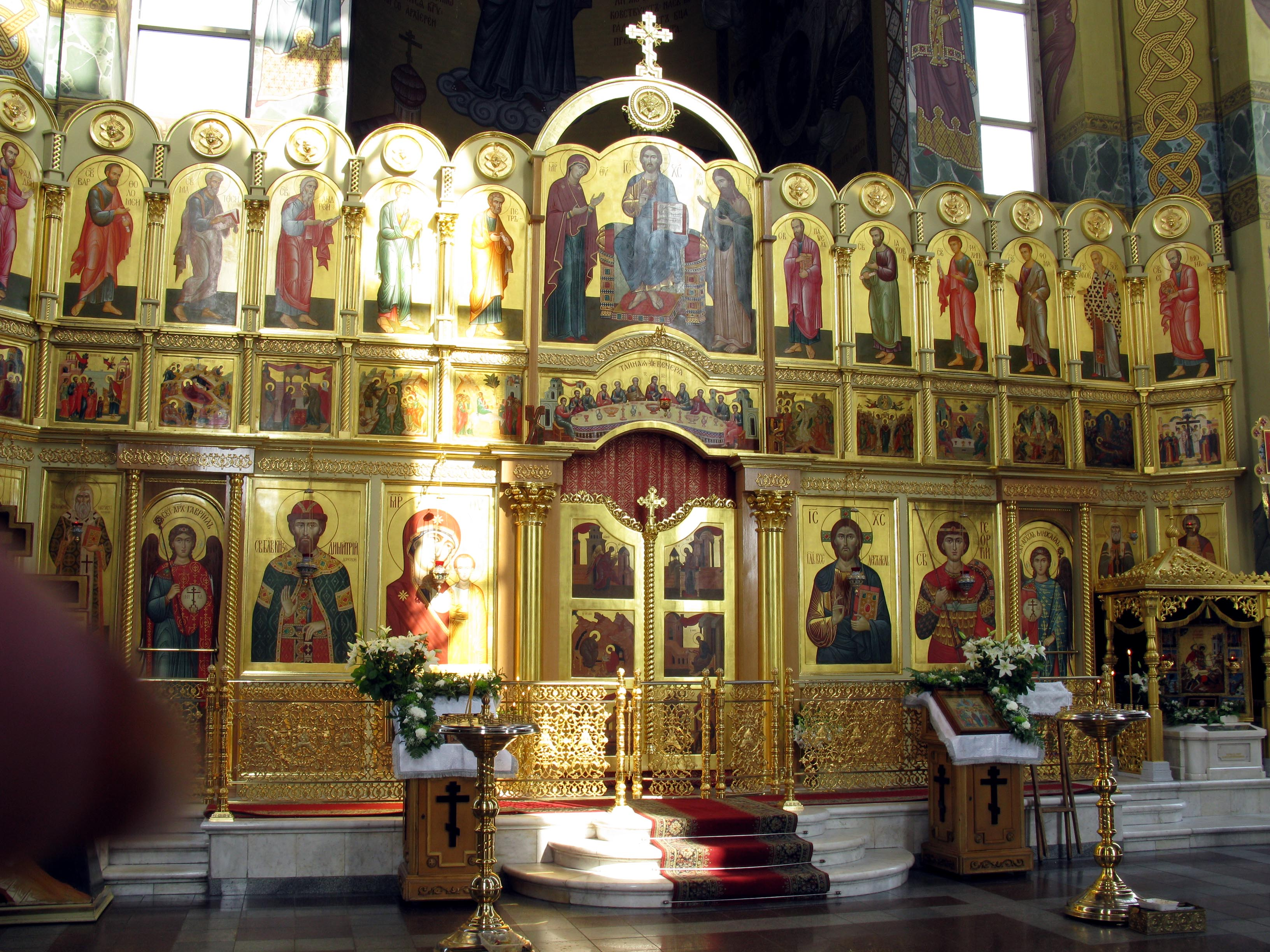 Храм Георгия Победоносца на Поклонной горе